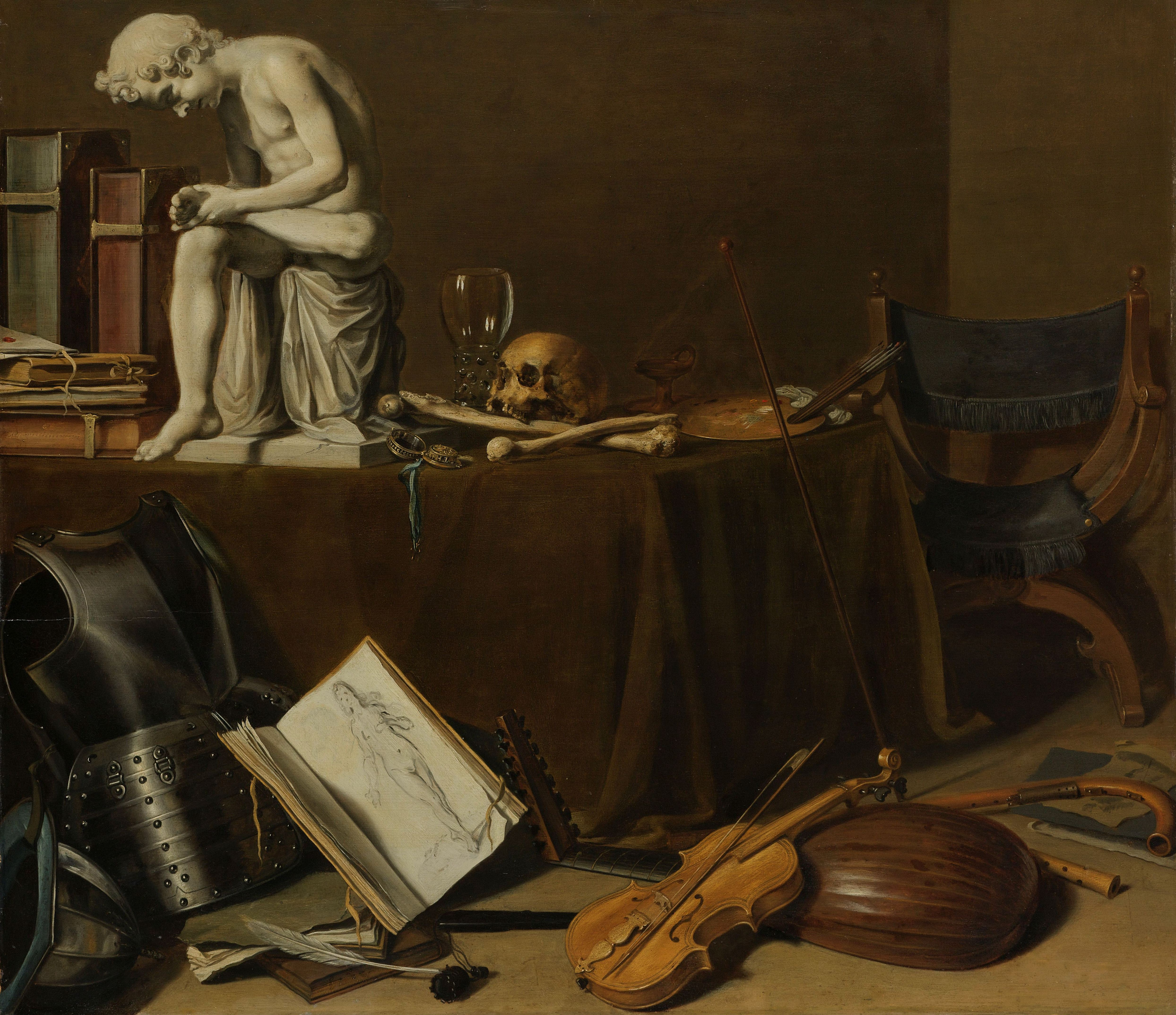 Vanitas stilleven. Op een tafel staan een gipsen beeld van de Doornuittrekker of Spinario, schedel met botten, roemer, horloge, boeken en paperassen, een gedoofde olielamp en een schilderspalet met penselen. Op de vloer muziekinstrumenten: luit, viool en een soort fluit. Links een harnas en een helm en een openstaande kunstboek met een tekening van een naakte vrouw.